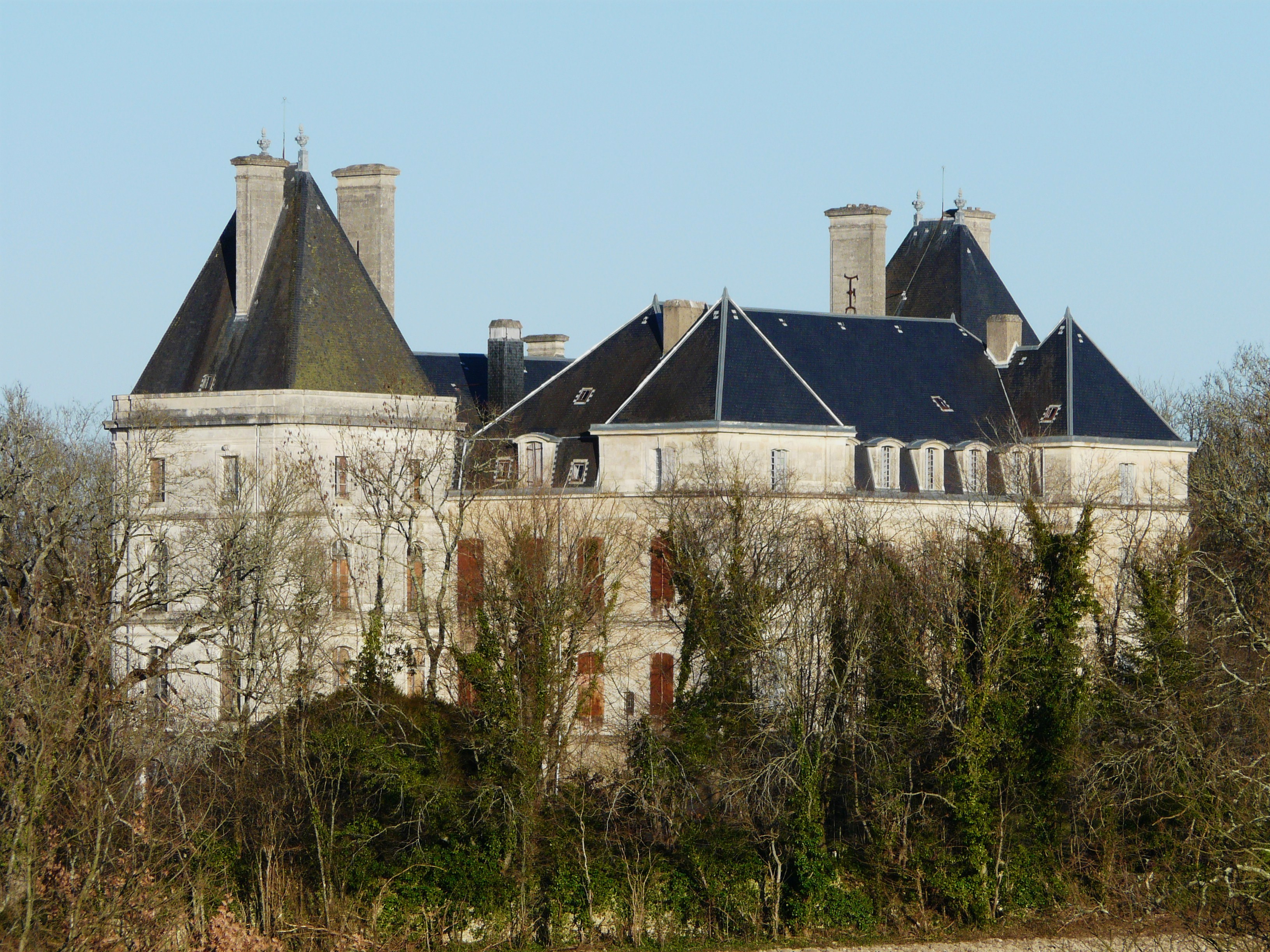 Le château de Fayolle vu de l'ouest, Tocane-Saint-Apre, Dordogne, France